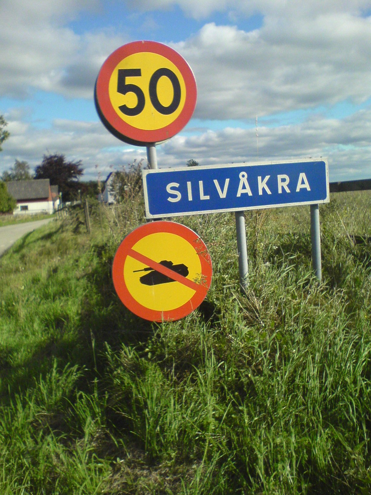 Skylt som markerar förbud mot pansarfordon